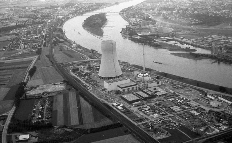 Rhein-Bodensee-Bereisung des Rates von Sachverständigen für Umweltfragen und des Bundesministeriums des Inneren. Kernkraftwerk Mülheim-Kärlich.